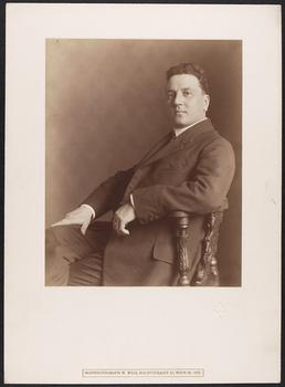 Georg Muratori (1875–1921), österreichischer Schauspieler